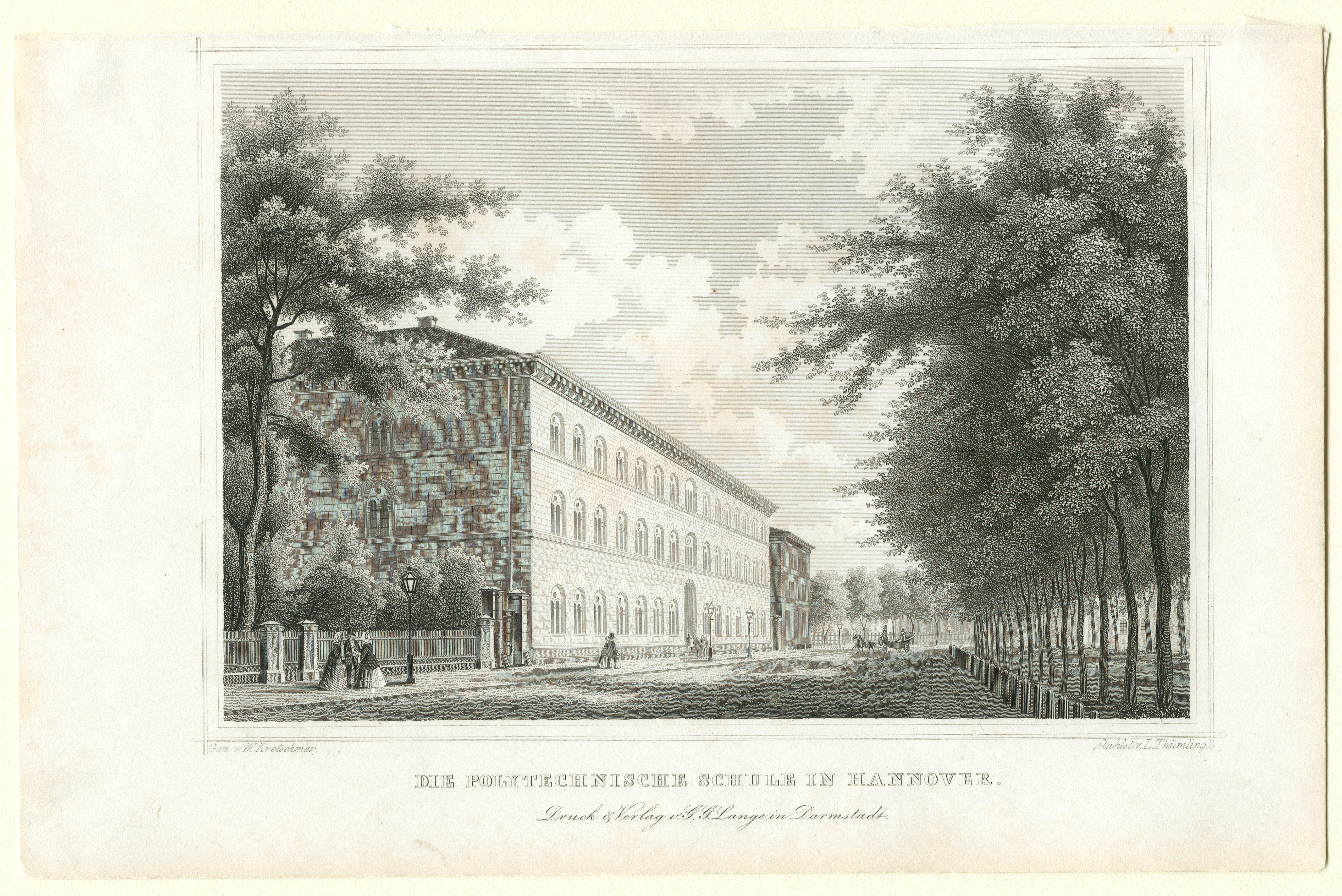 Blick durch die Georgstraße in Richtung des späteren Kröpcke; links die Polytechnische Schule (am Standort des heutigen Kröpcke-Centers), Vorläufer der heutigen Leibniz Universität Hannover. Das Café Robby (später: Café Kröpcke) wird erst 1869 rechts am Opernplatz gebaut werden.